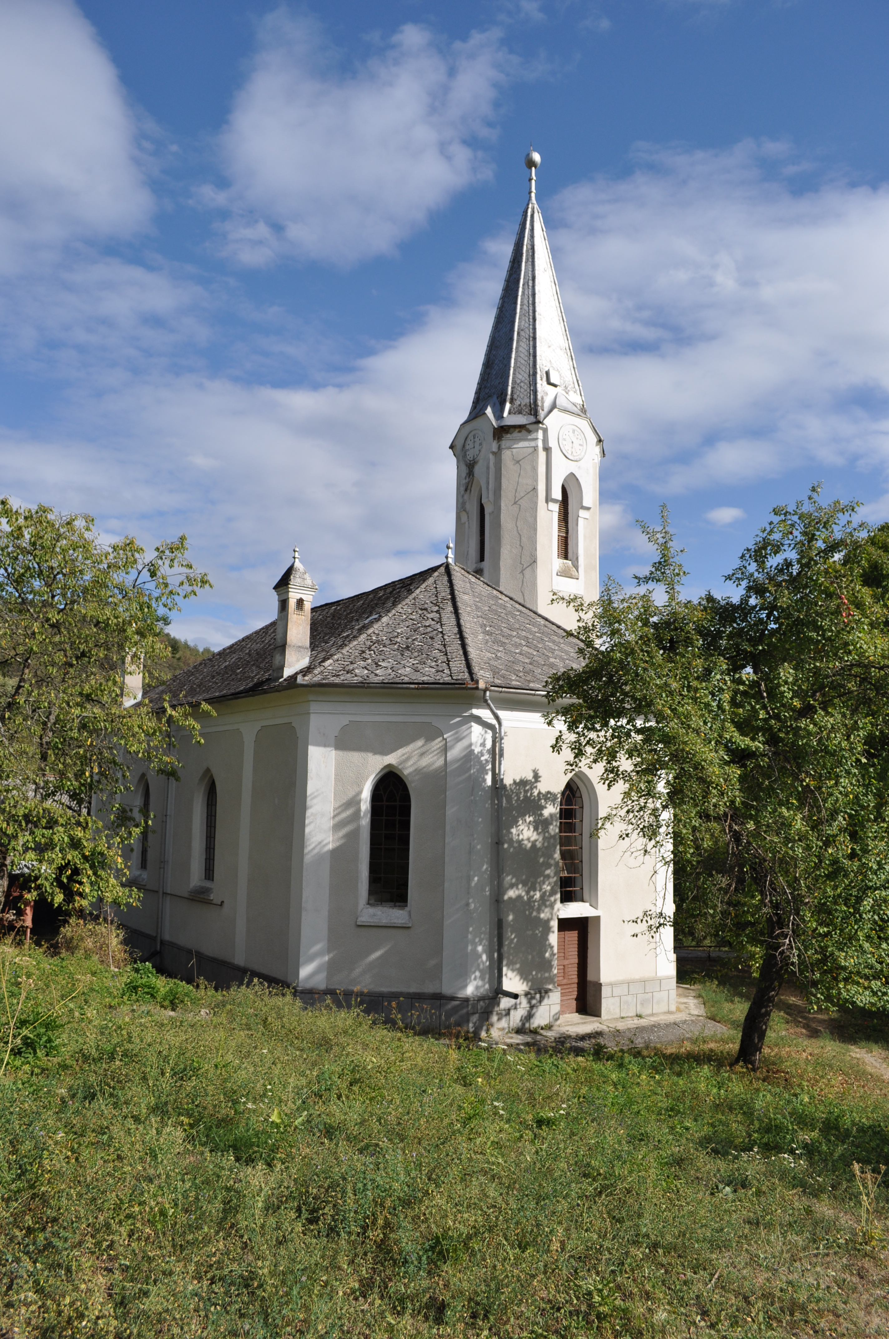 Biserica reformată, sat MALIN; comuna NUŞENI